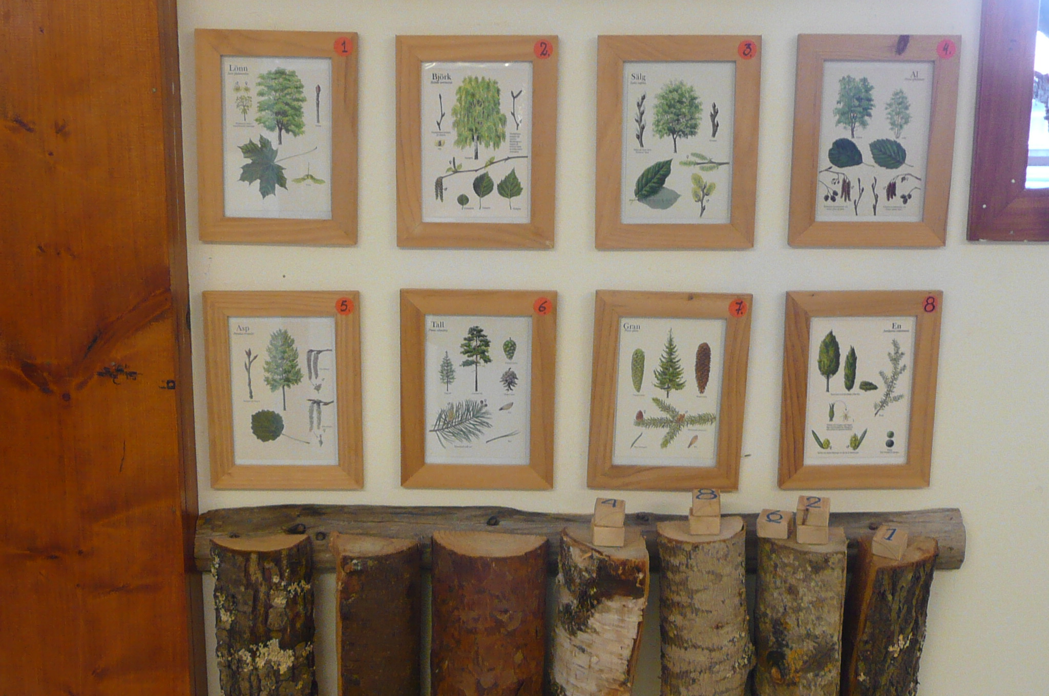 I vårt upptäckarrum finns det mycket att göra. Här är en övning där du ska para ihop stammarna från olika trädslag med den tavla som visar trädet.